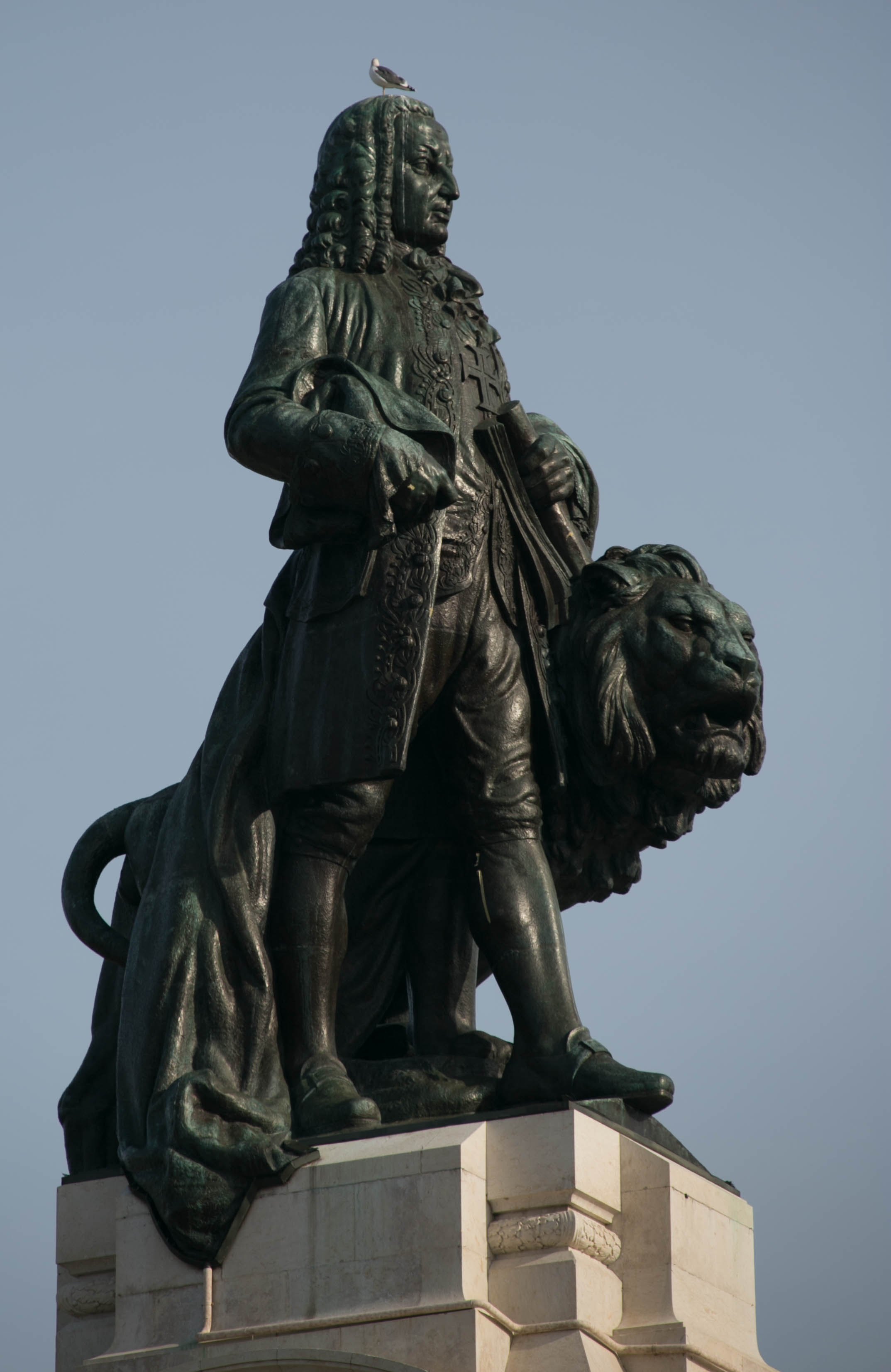 F29A4986